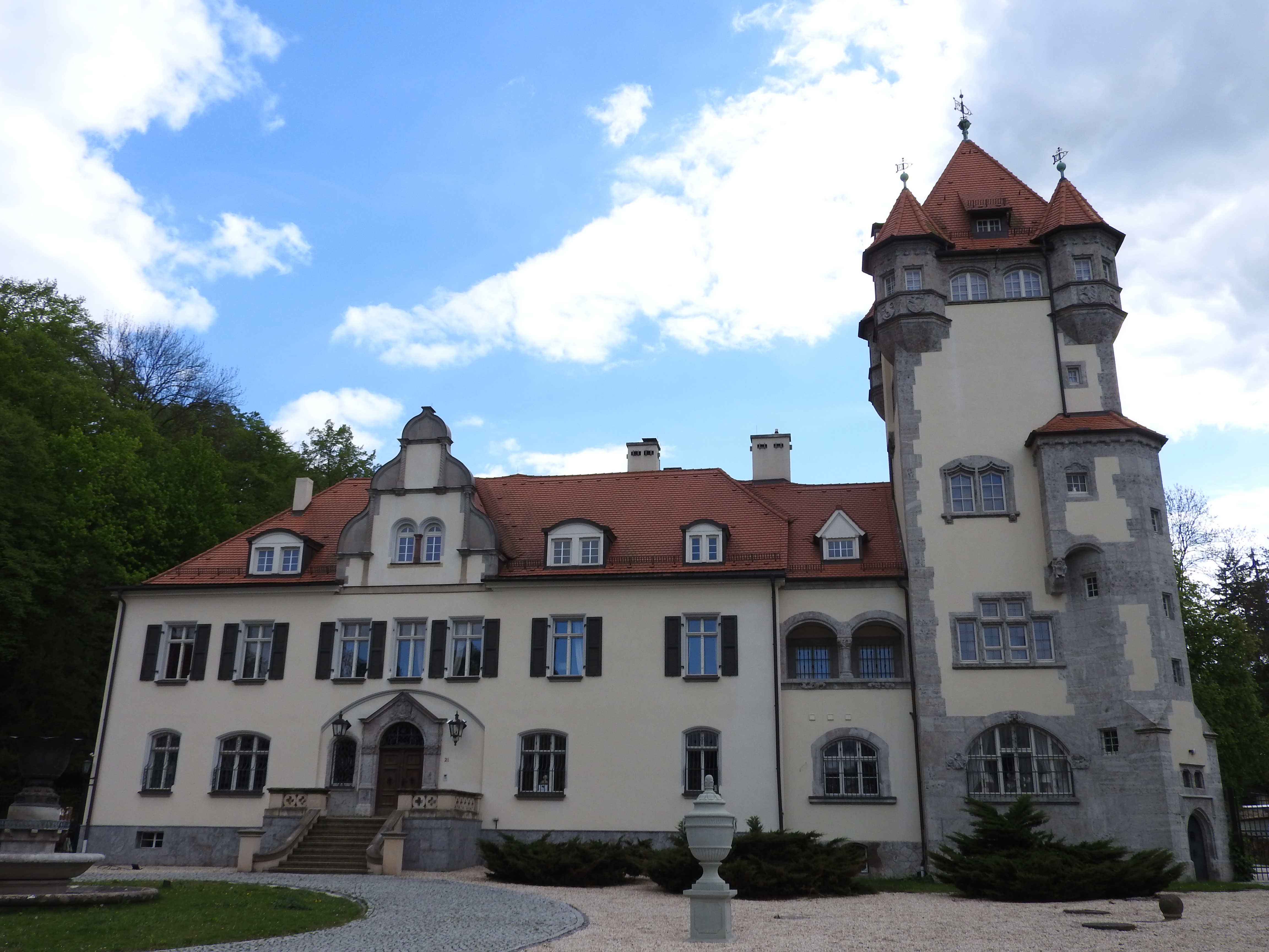 Schloss Kospoda, Thüringen